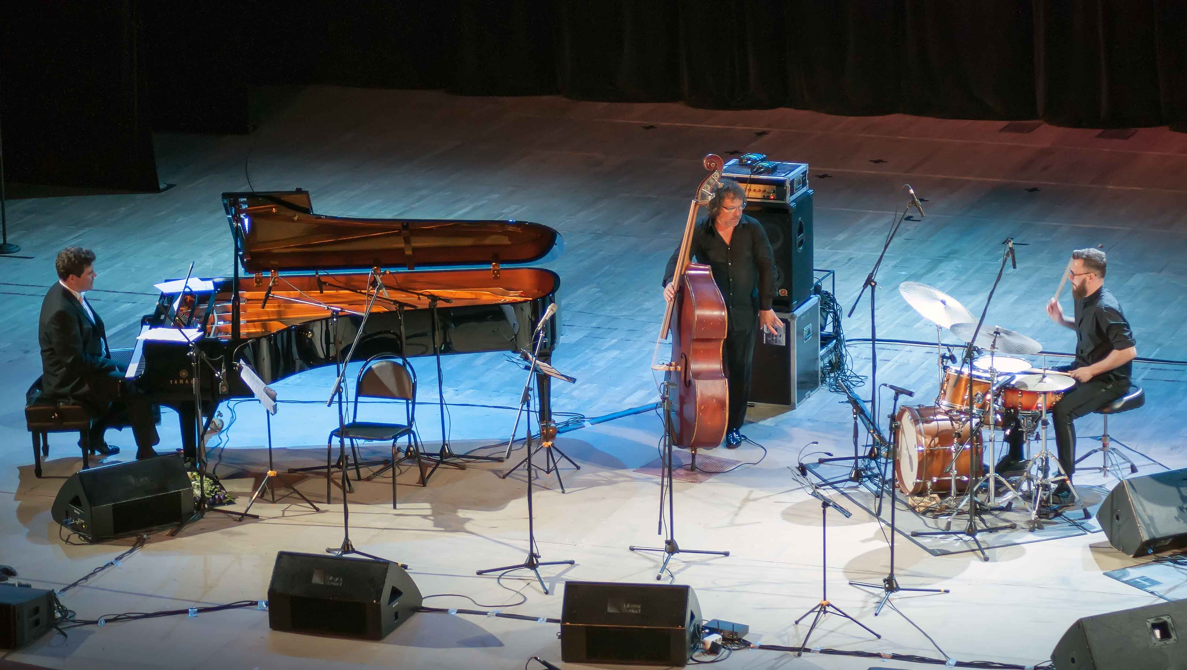 И классика, и джаз